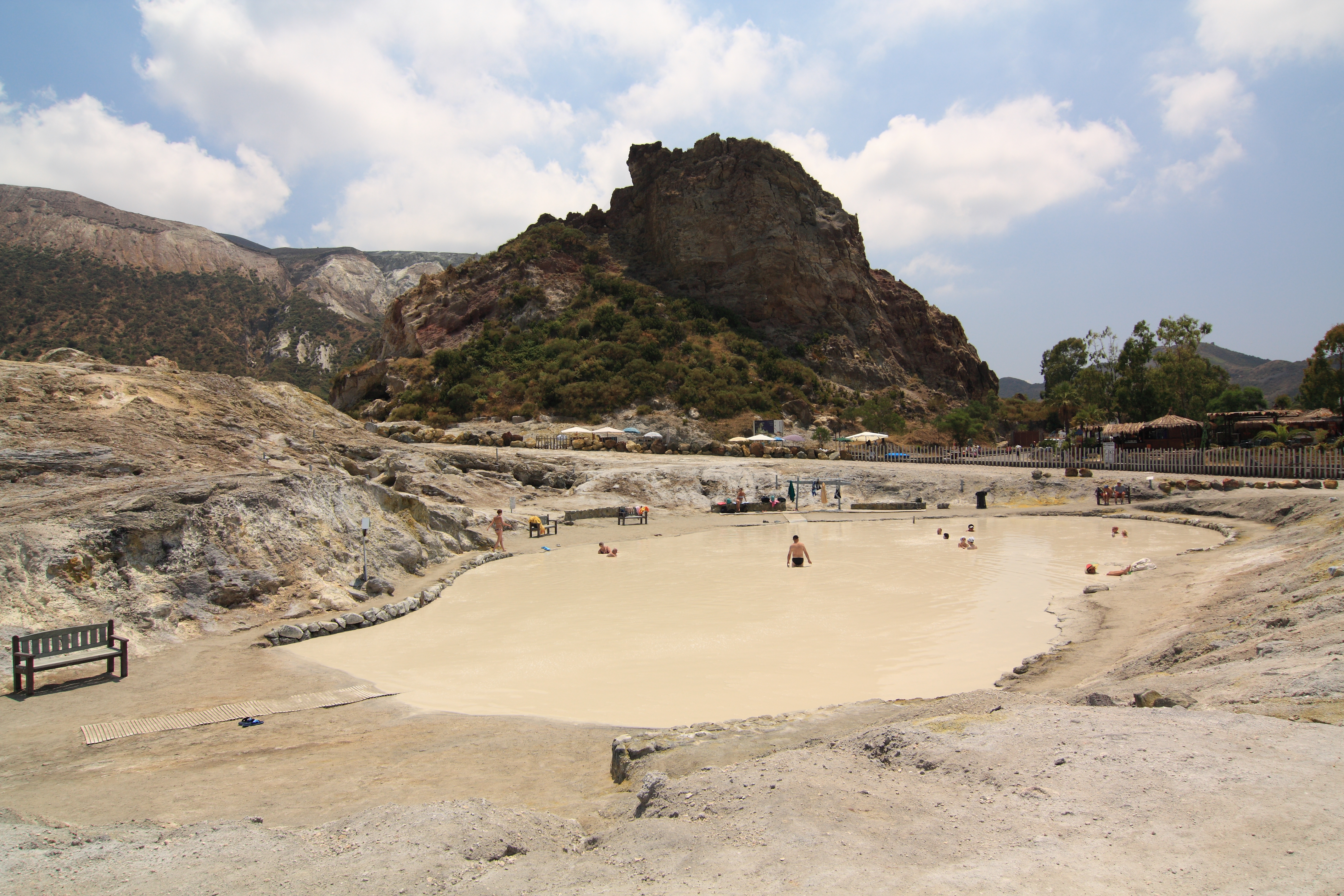 La foto non trasmette l'odore di zolfo !